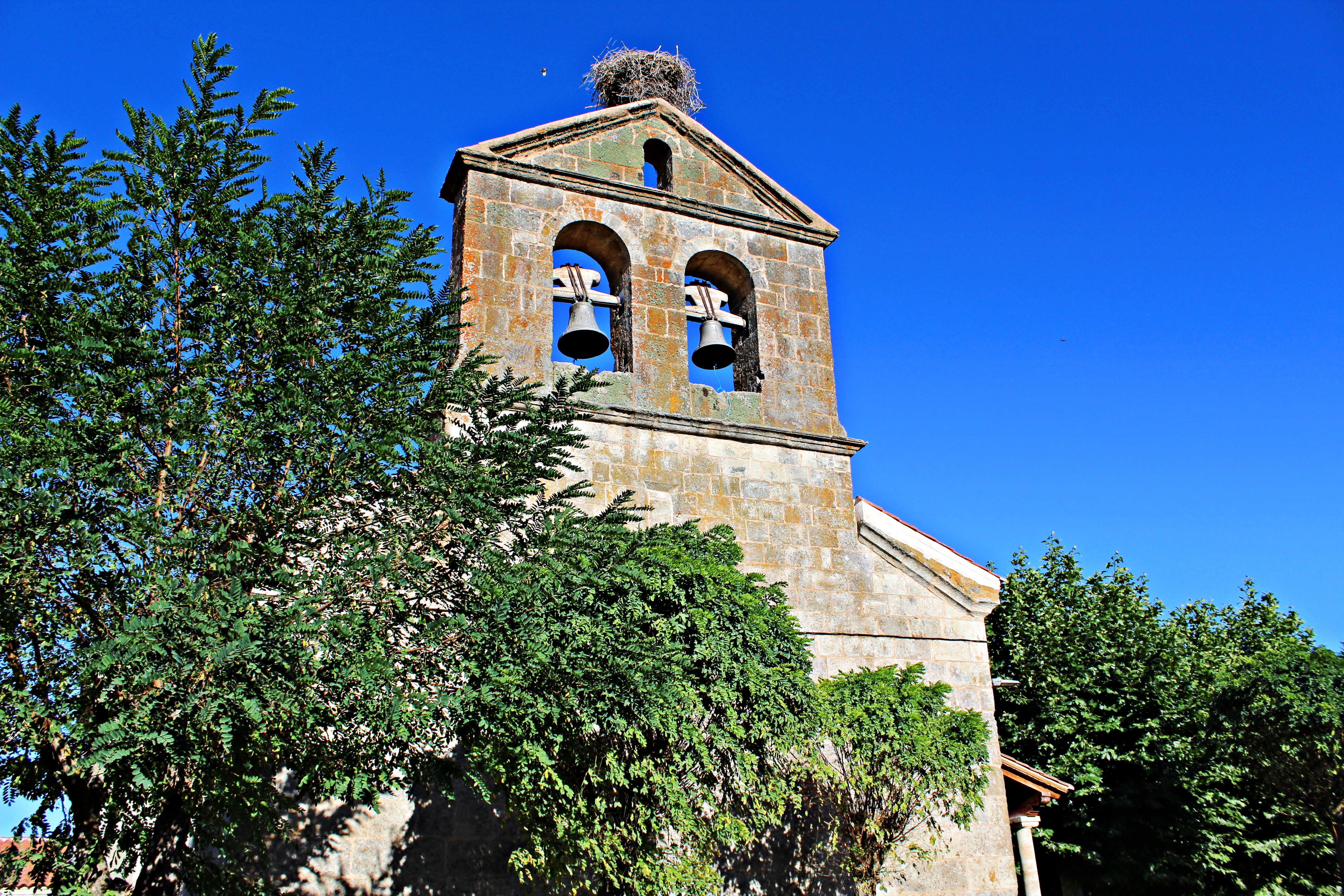 Campanario de la Iglesia de Zarapicos, provincia de Salamanca